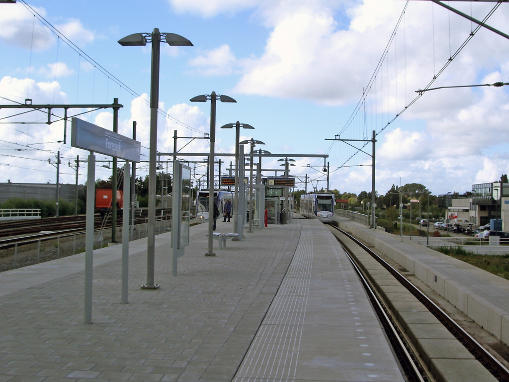 Station Forepark, nieuwe halte van RandstadRail